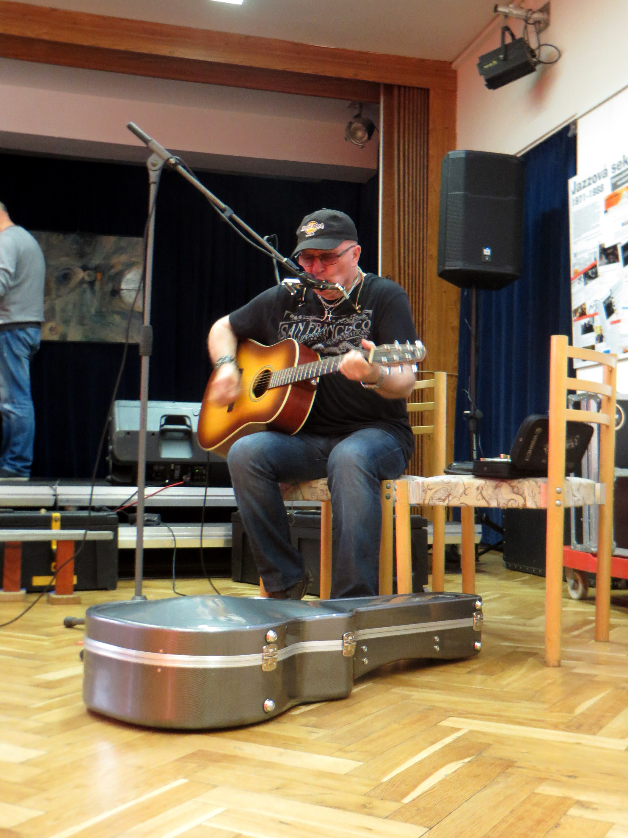 Ivan Hajniš a jeho buesový set na vernisáži výstavy o Jazzové sekci. Kulturní dům v Kolíně.